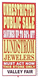 From Image:Advertisingman.jpg